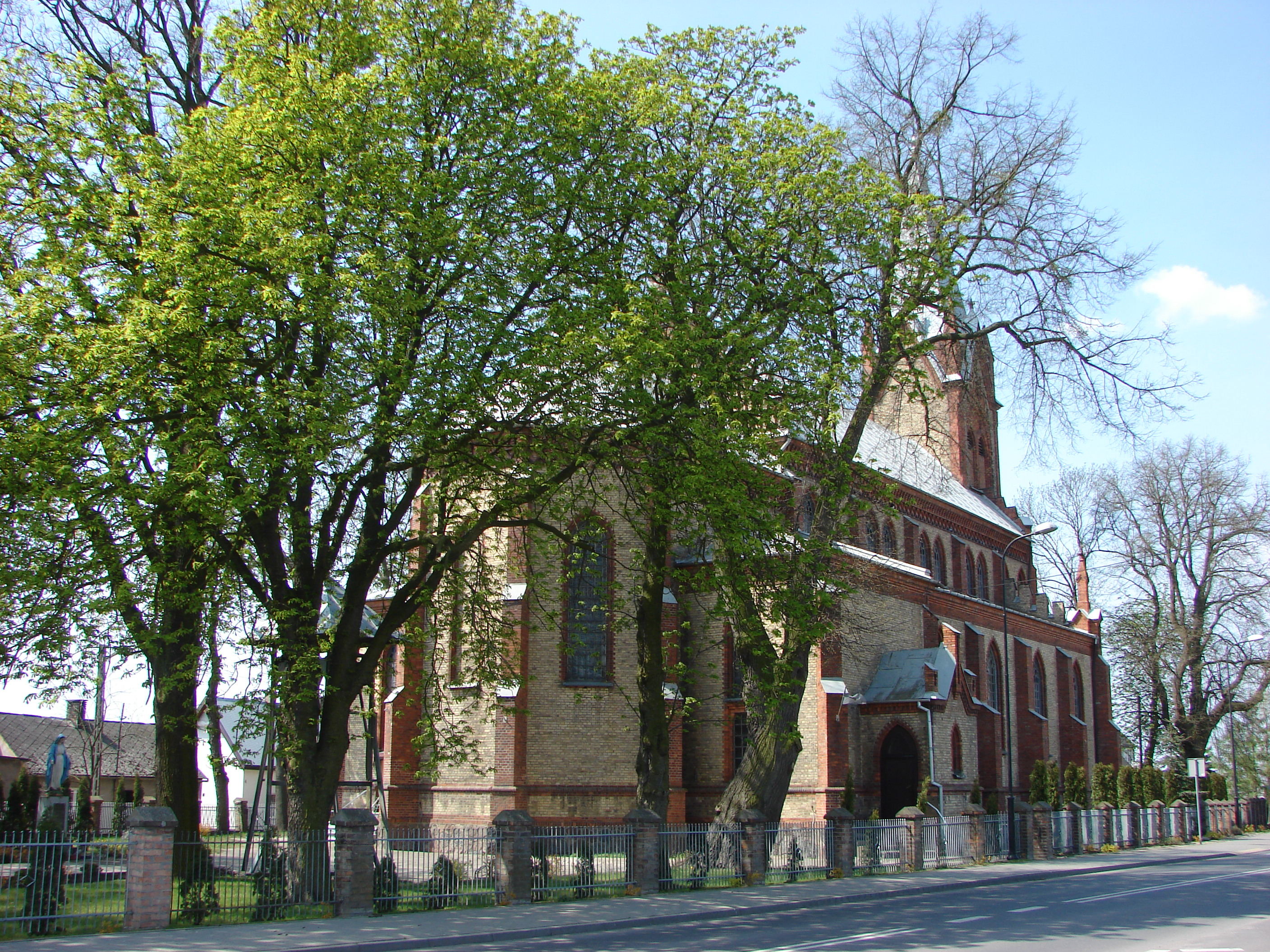 Koneck, Aleksandrów County. Church of St Procopius, 1902.